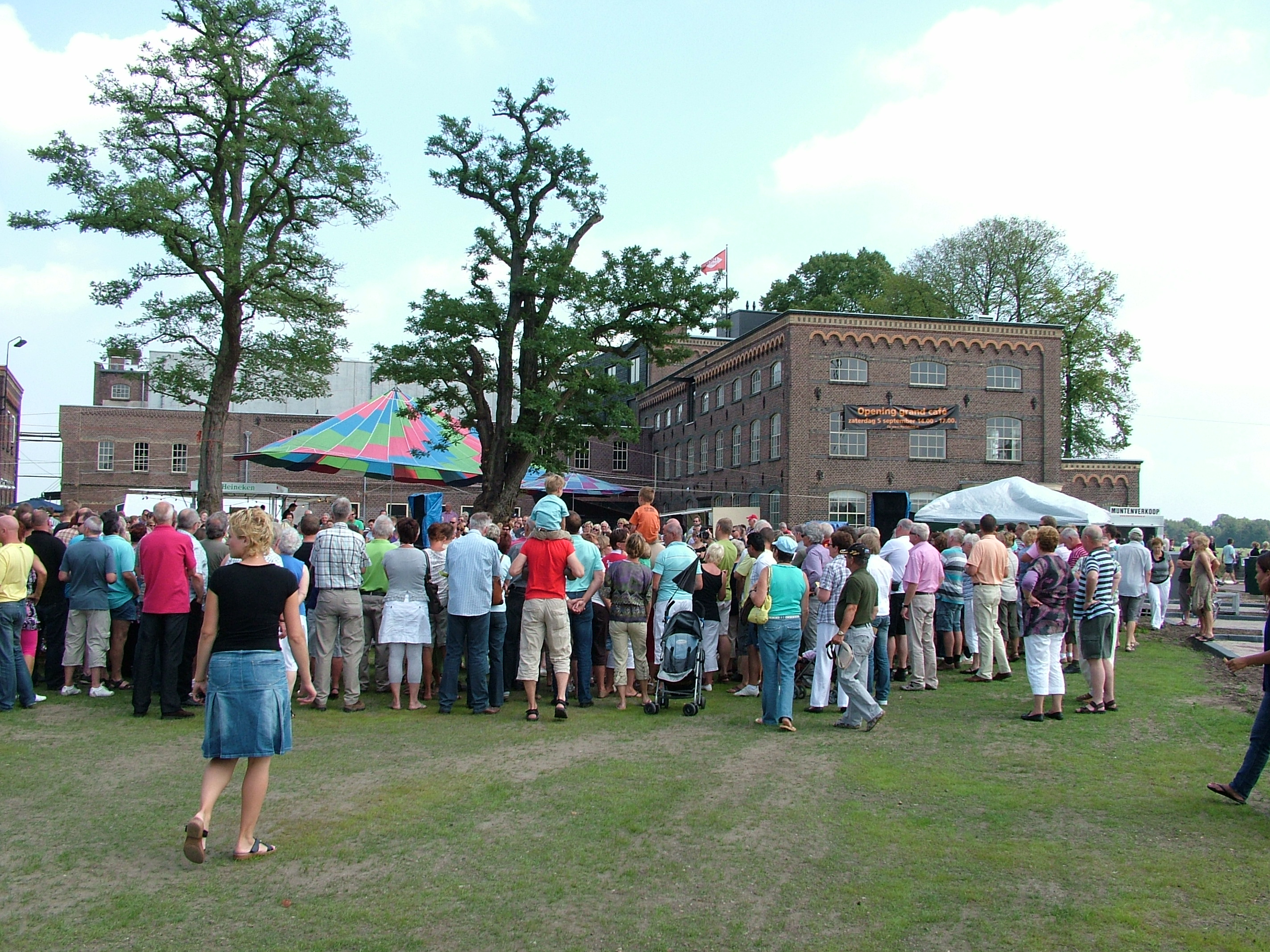 Achterhoek Spektakel Tour, DRU, Ulft (Oude IJsselstreek).